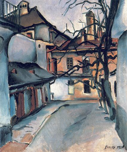 Ze starých Košic